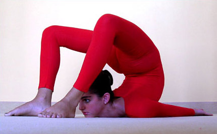 Ejercicio de contorsionismo: backbend